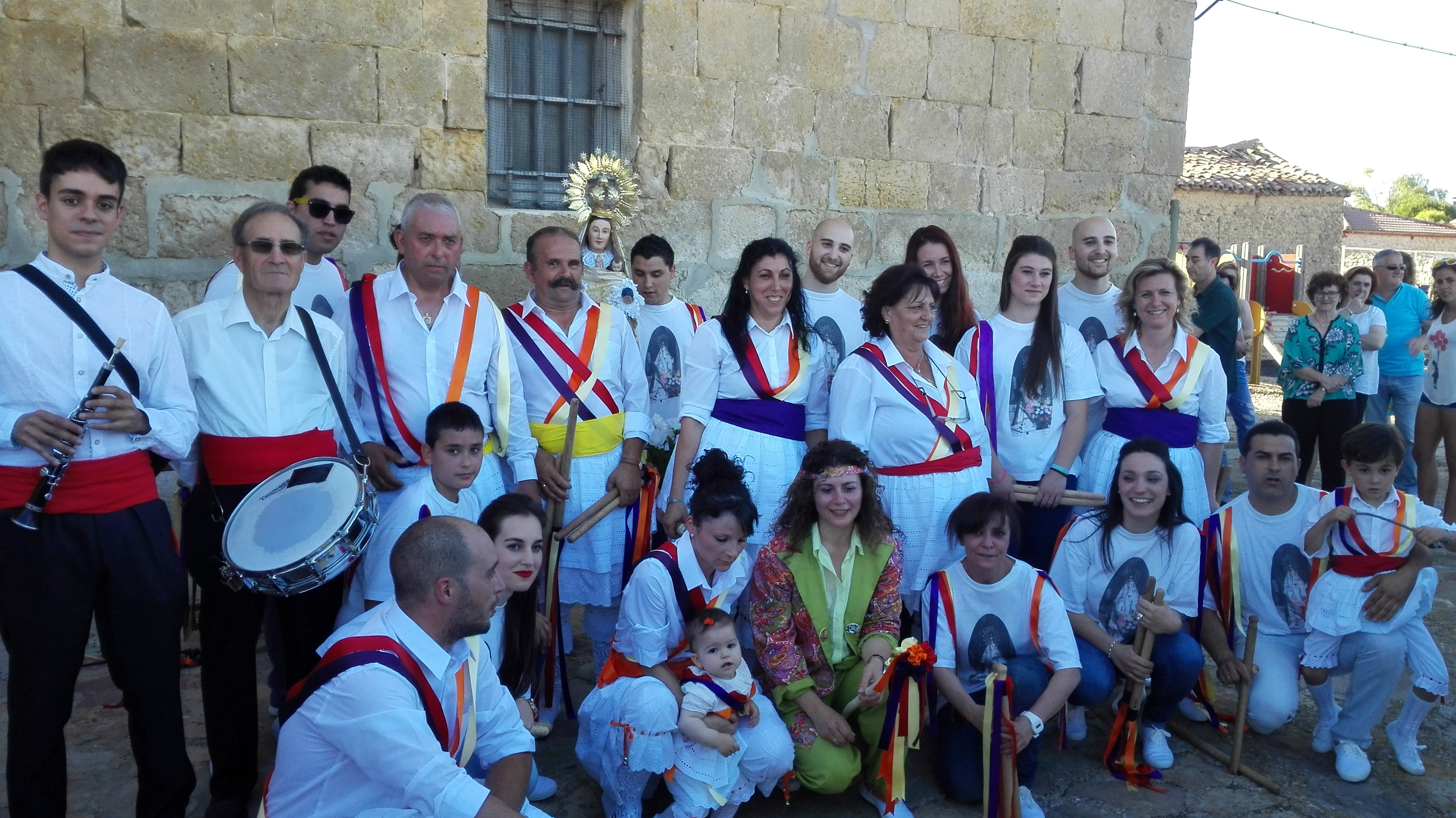 Danzantes de paloteo de Paredes de Monte, Palencia, España. Procesión de la Virgen de las Nieves. Músicos (dulzainero y tamborilero), chiborra y cuadrilla de danzantes.